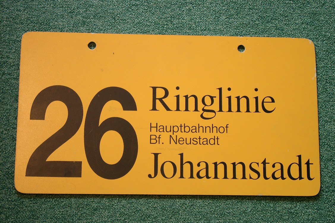 Liniennummernschild Straßenbahnlinie 26 (Dresden)